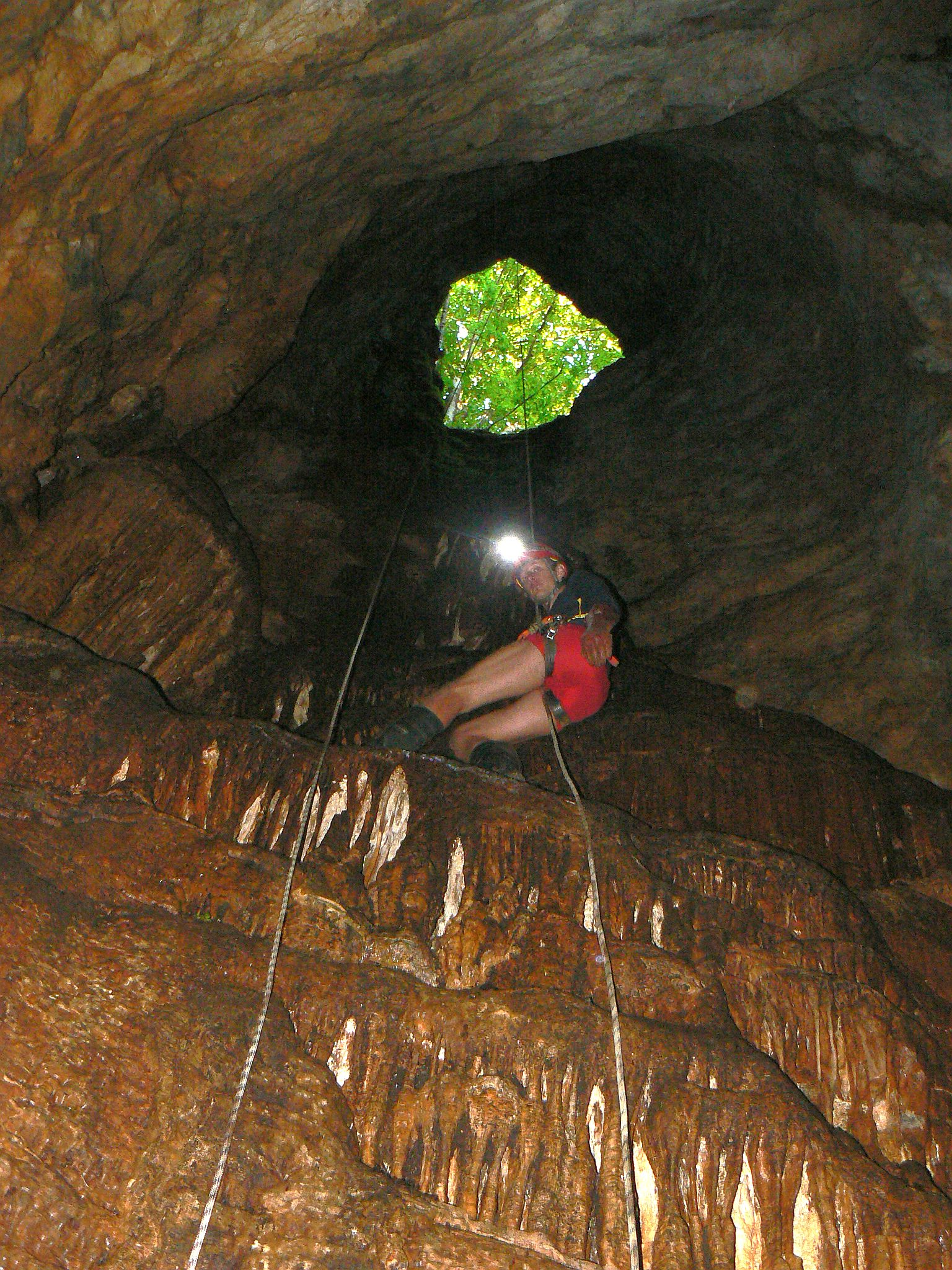 Vstupná šachta Lipovníckeho veľkého zombora (pohľad z dna). Steny v spodnej časti šachty zdobia senilné sintrové nátekové formy. Hore sa črtá kruhový obrys ústia.